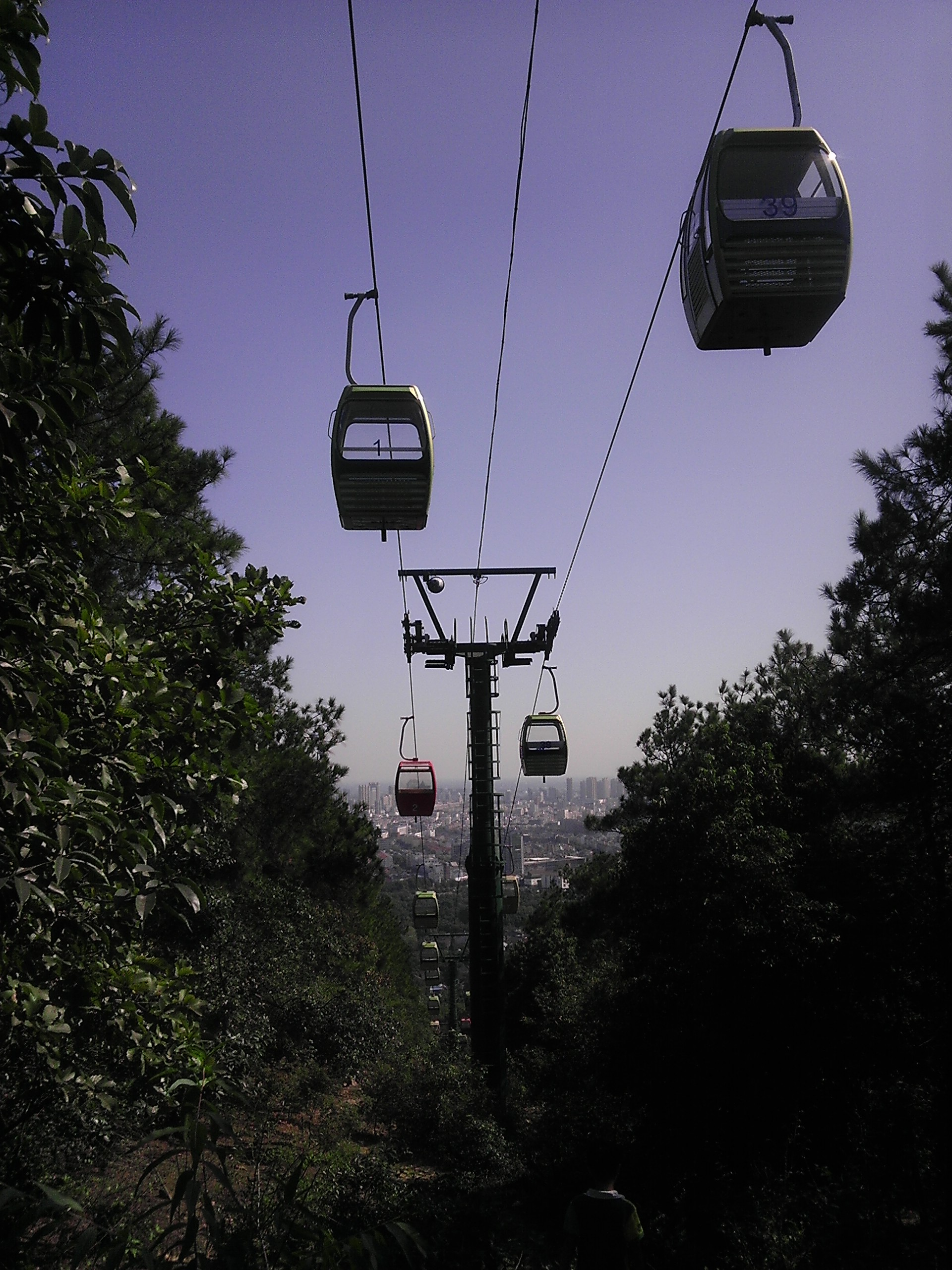 Changshu, Suzhou, Jiangsu, China